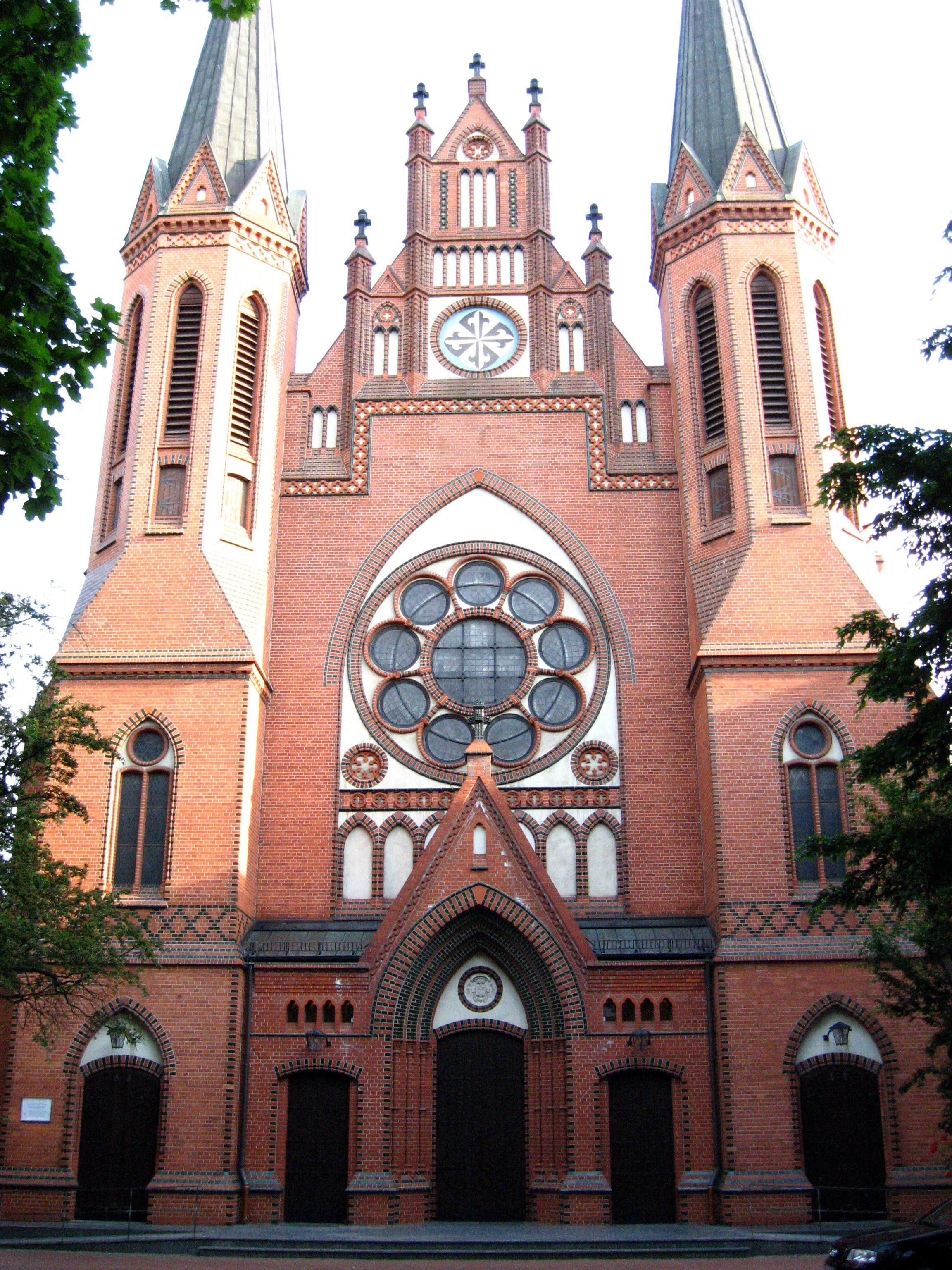 Berlin-Moabit - St. Paulus - Außenansicht